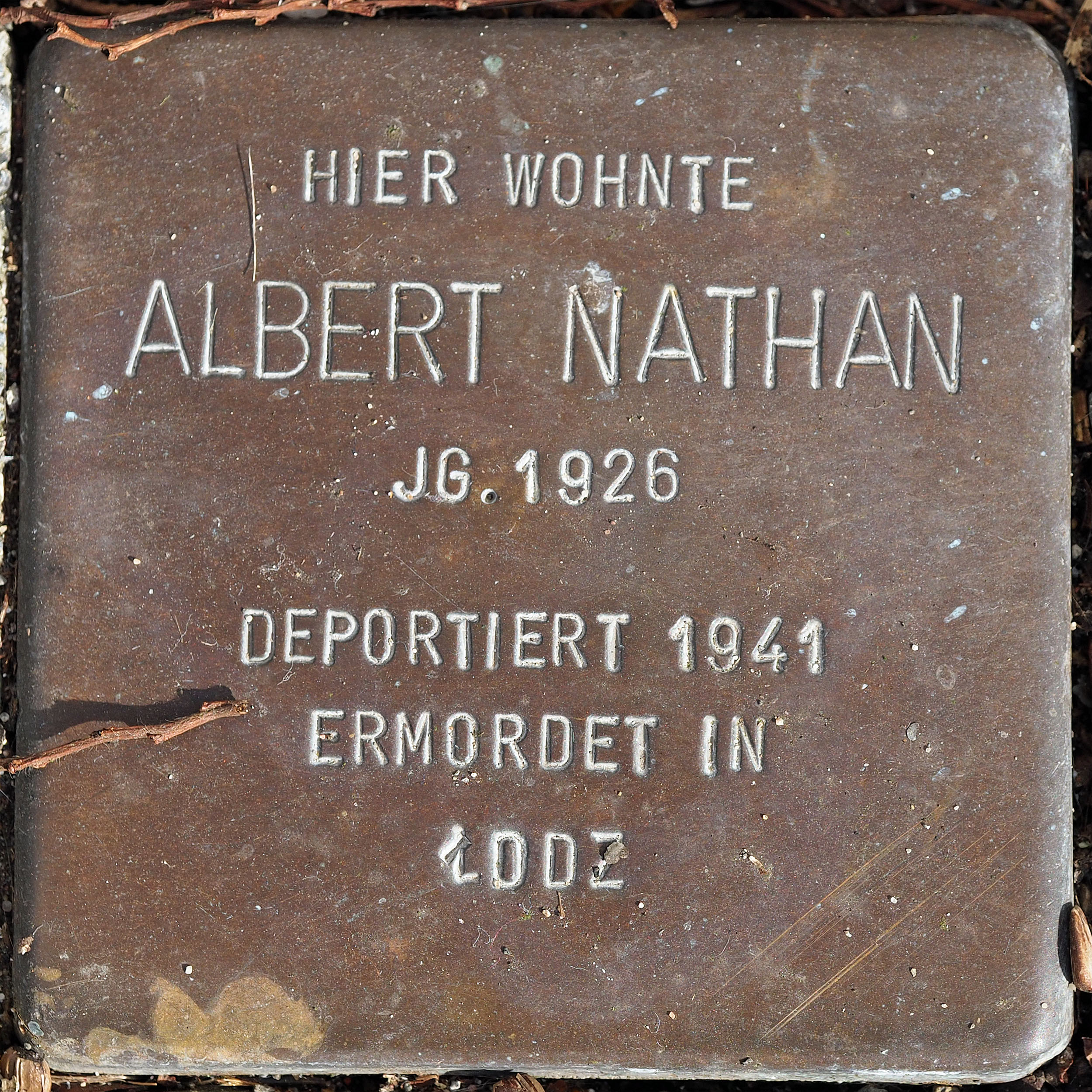 Stolperstein DU: Nathan, Albert